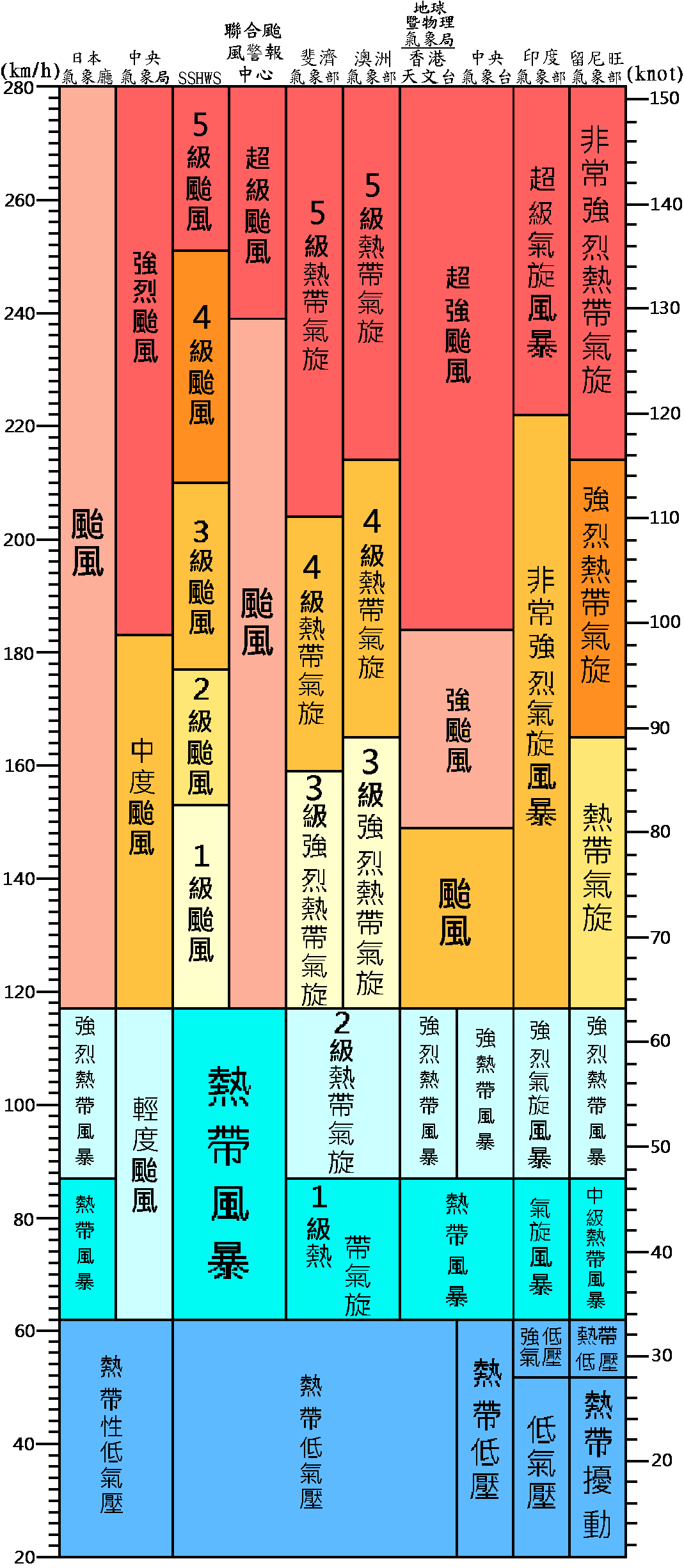 中文（台灣）: 全球各氣象台之颱風分級表